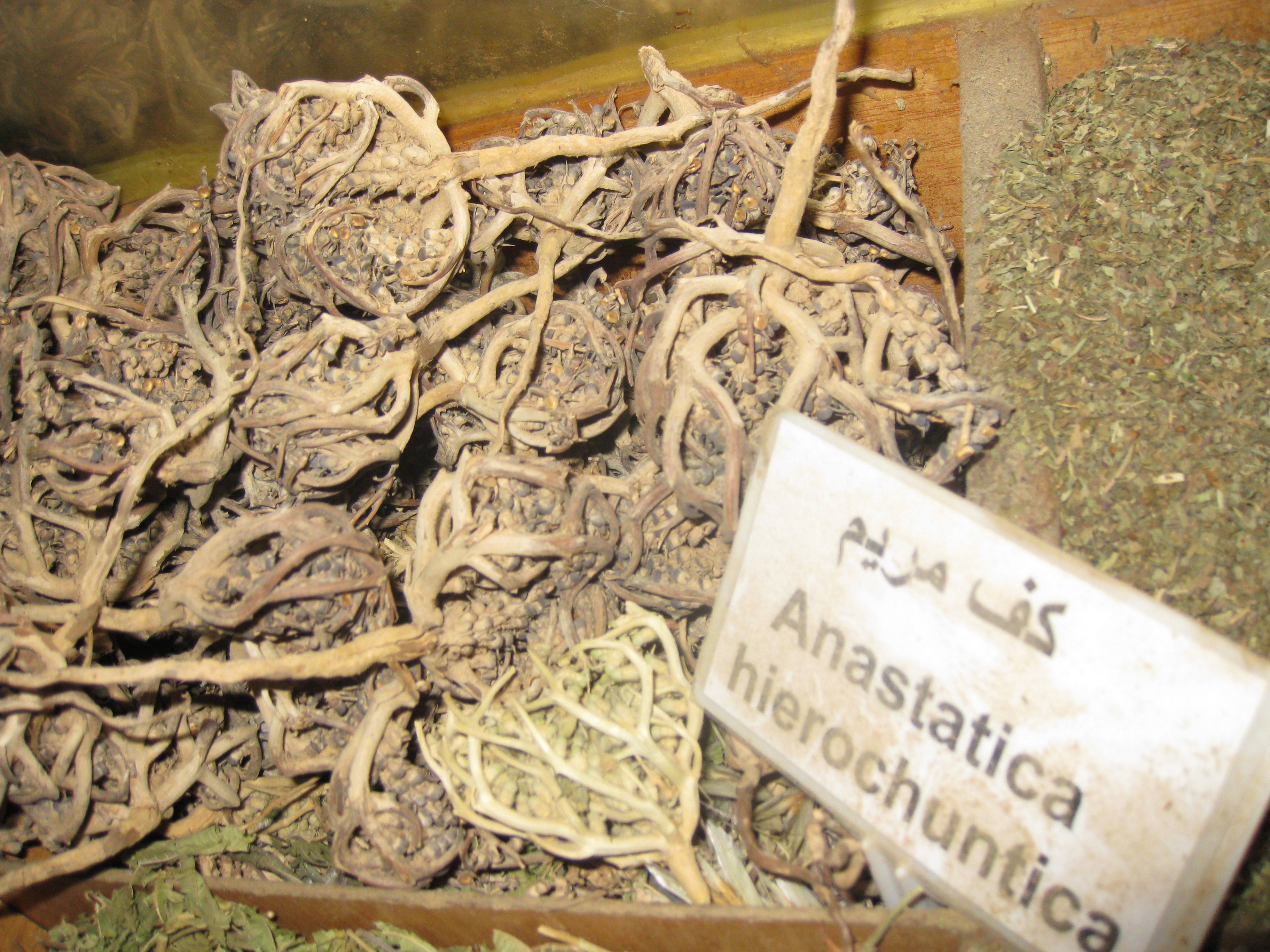 Old City of Jerusalem - the Market שווקי העיר העתיקה של ירושלים